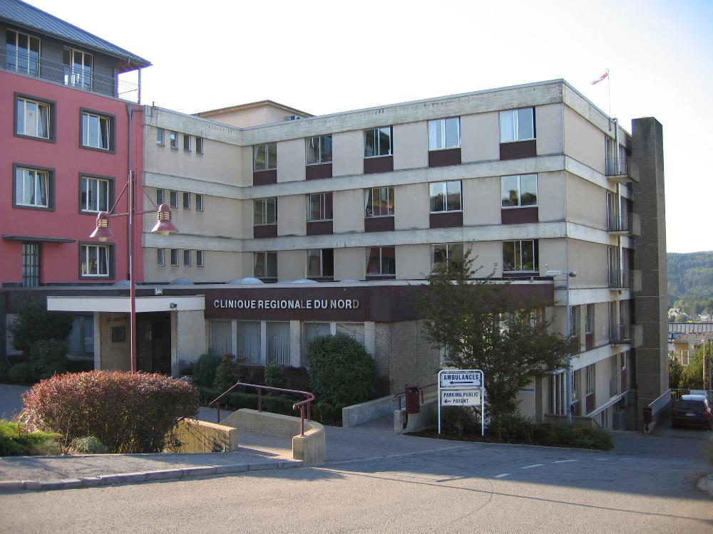 D'Clinique vu Wolz. Foto vum Pear 11:39, 9 September 2006 (UTC) 08.09.2006.